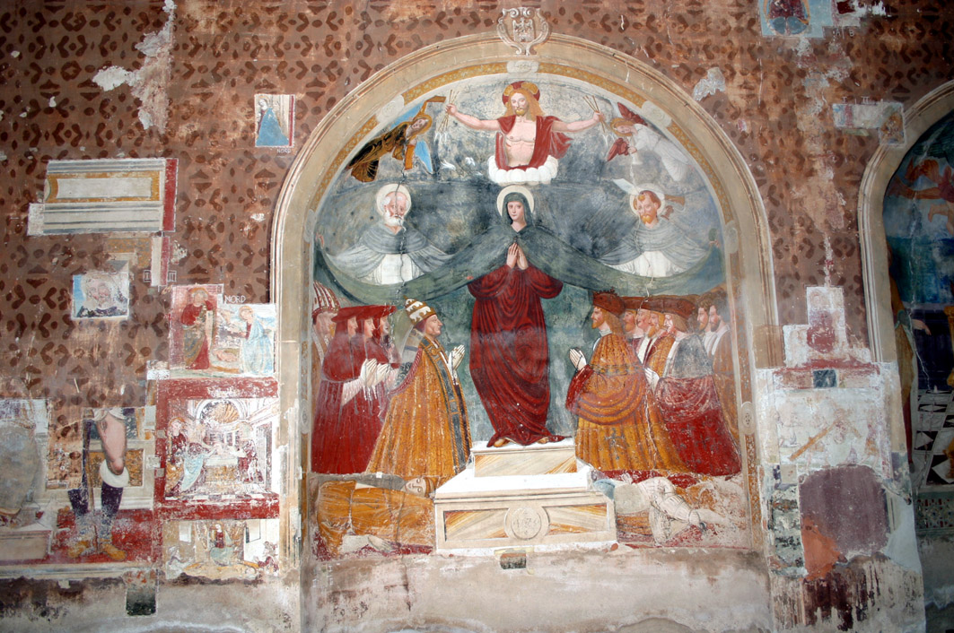 Affresco in Santa Maria della Neve, Cislago